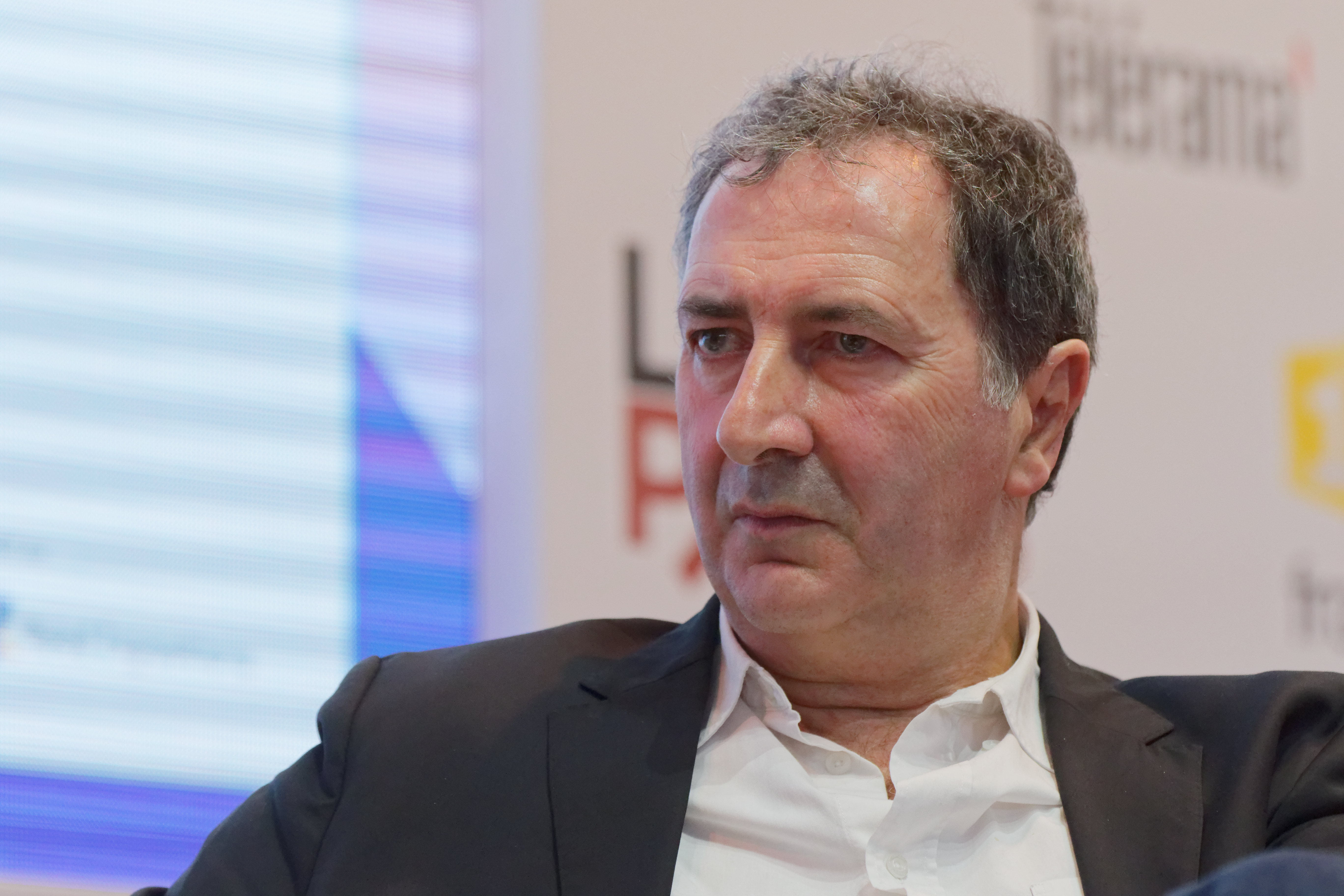 François Morel en conférence lors du salon du livre de Paris 2017.